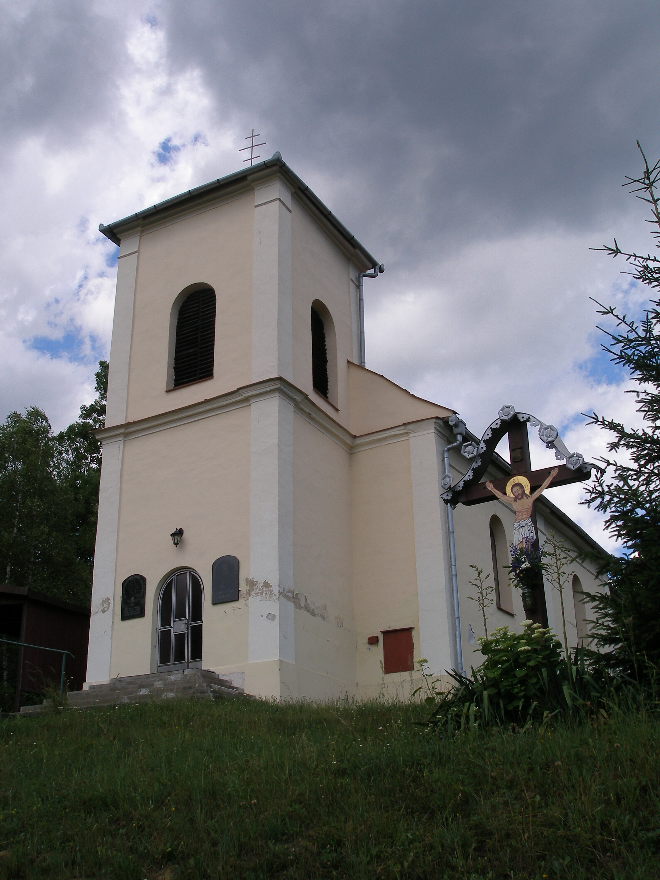 Ľubovec, obec v okrese Prešov, región Šariš kostol v miestnej časti Ruské Pekľany